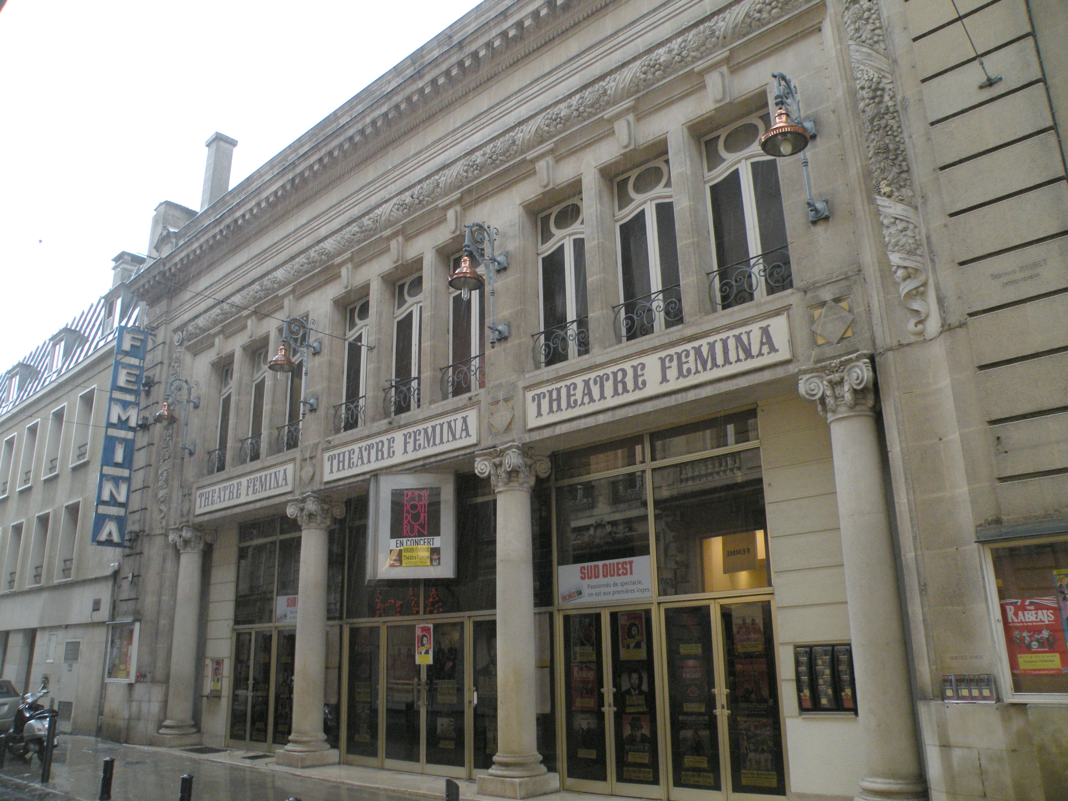 Le théâtre Femina à Bordeaux.